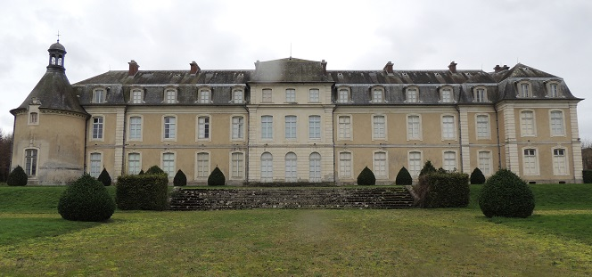 Château des Perrais vue depuis la terrasse, en herbe, avec des buissons de buis dont une tour ronde à gauche et un pavillon à droite